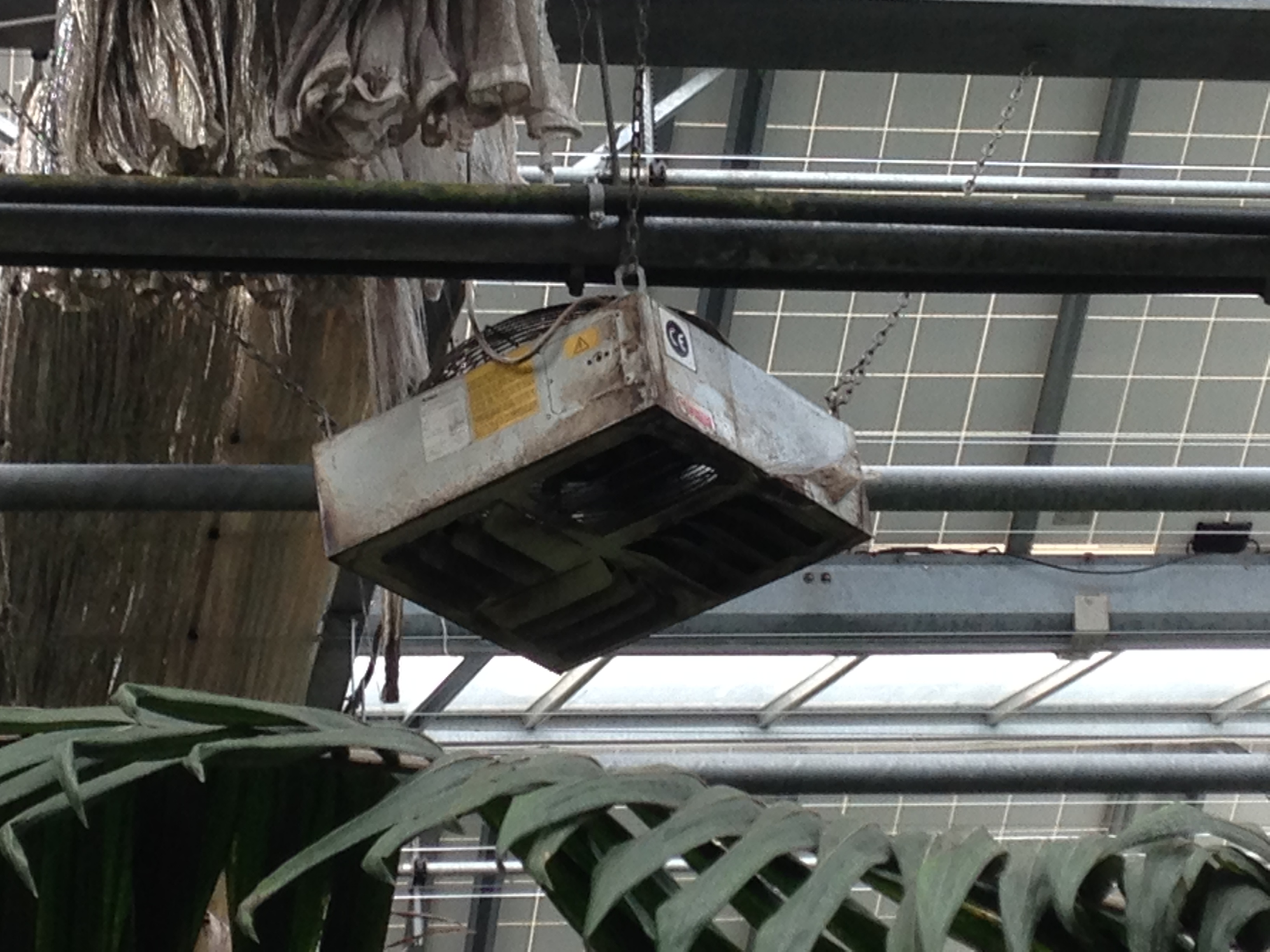 Destratificatore d'aria Riello alla serra Isola Aldabra del bioparco di Valbrembo